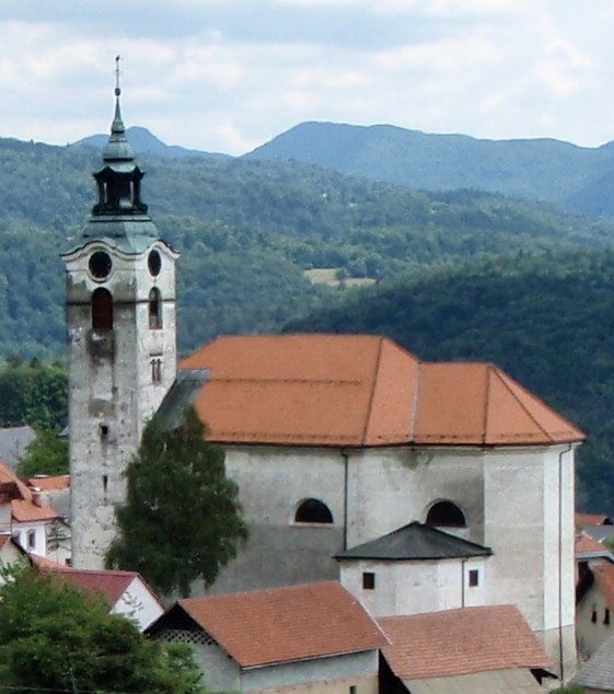 Pogled na selo Vače sa GEOSSA